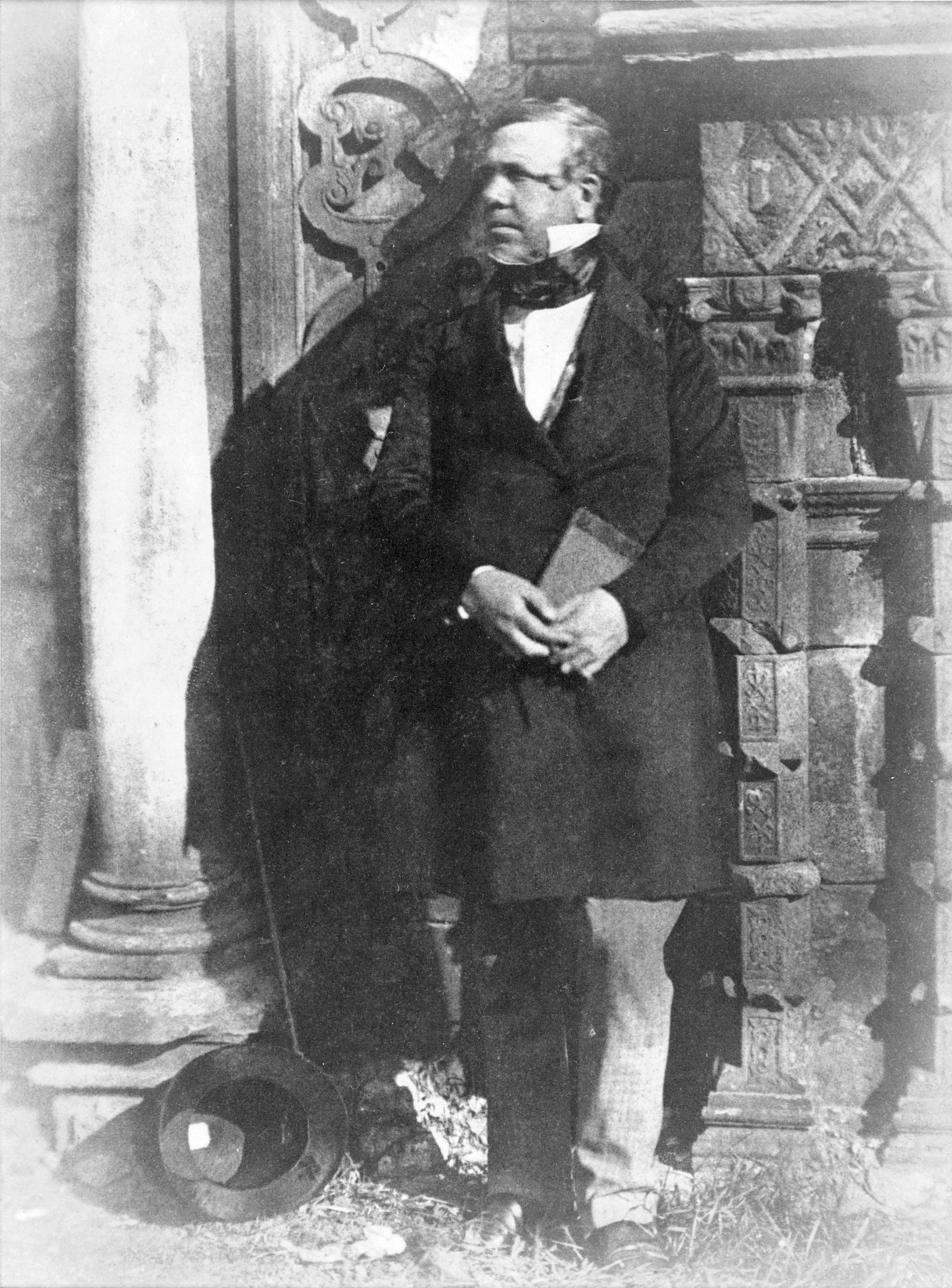 Painter David Roberts